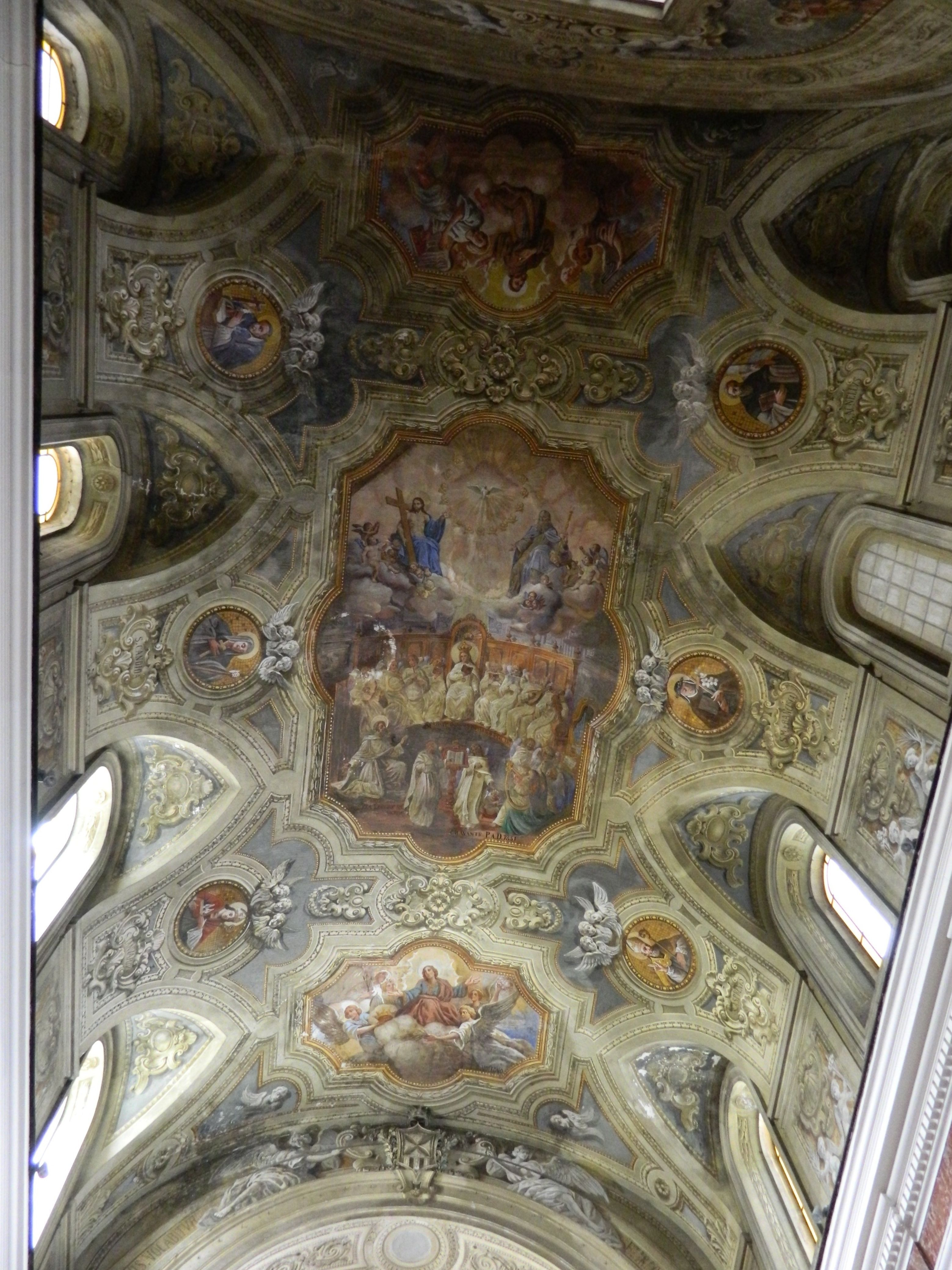 Volta, Santa Maria della Mercede, Napoli